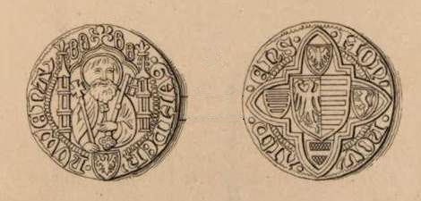 Weißpfennig des Grafen Gumprecht II. von Neuenahr (* um 1400; † 1484), 2. Hälfte des 15. Jahrhunderts